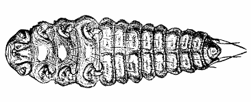 YOUNG LARVA OF PLATYPSYLLUS CASTORIS